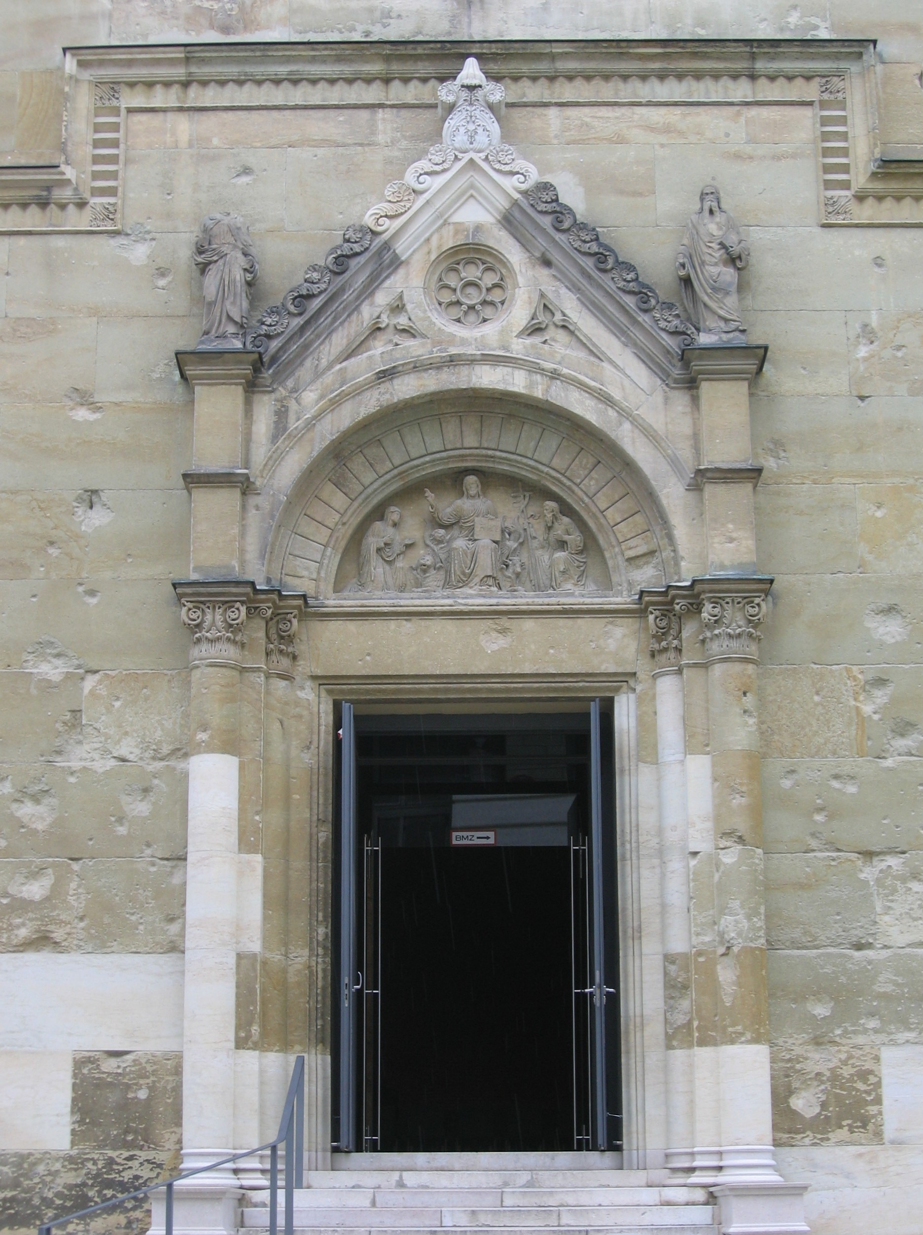 Allerheiligen-Hofkirche, Residenz München